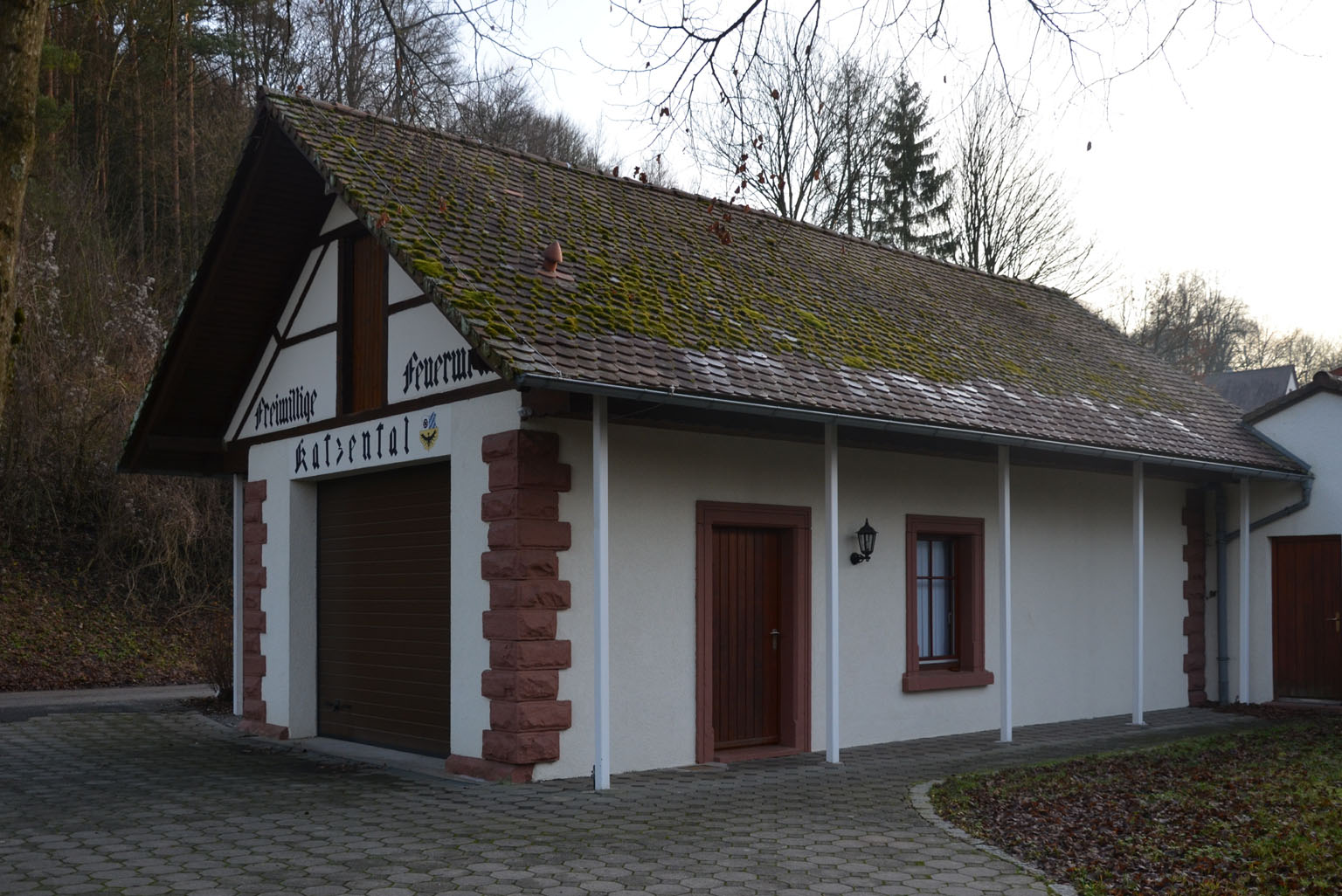 ehemaliges Bahnhofsgebäude der Schefflenztalbahn in Katzental, heute Gebäude der Freiwilligen Feuerwehr.